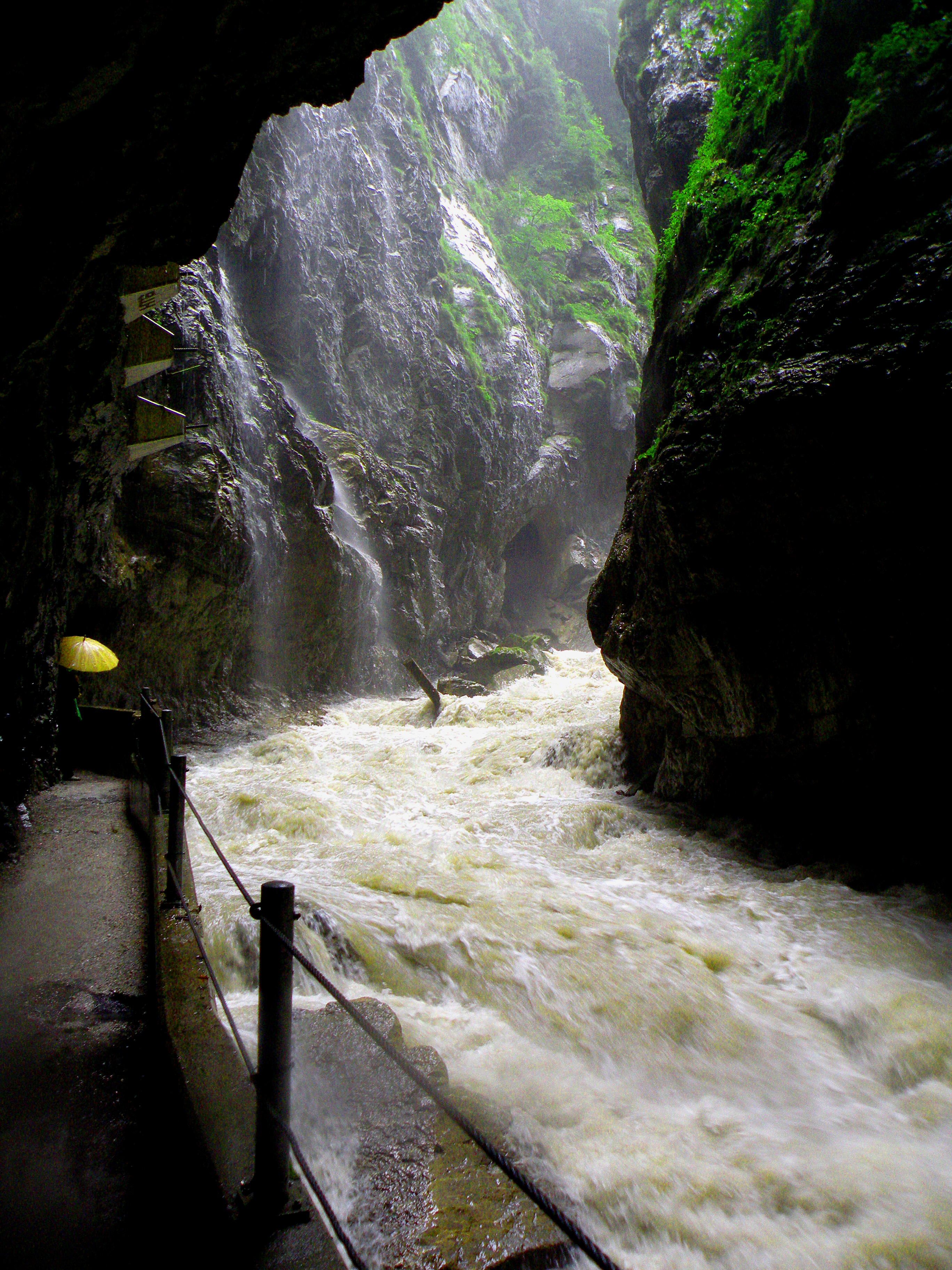 Partnachklamm